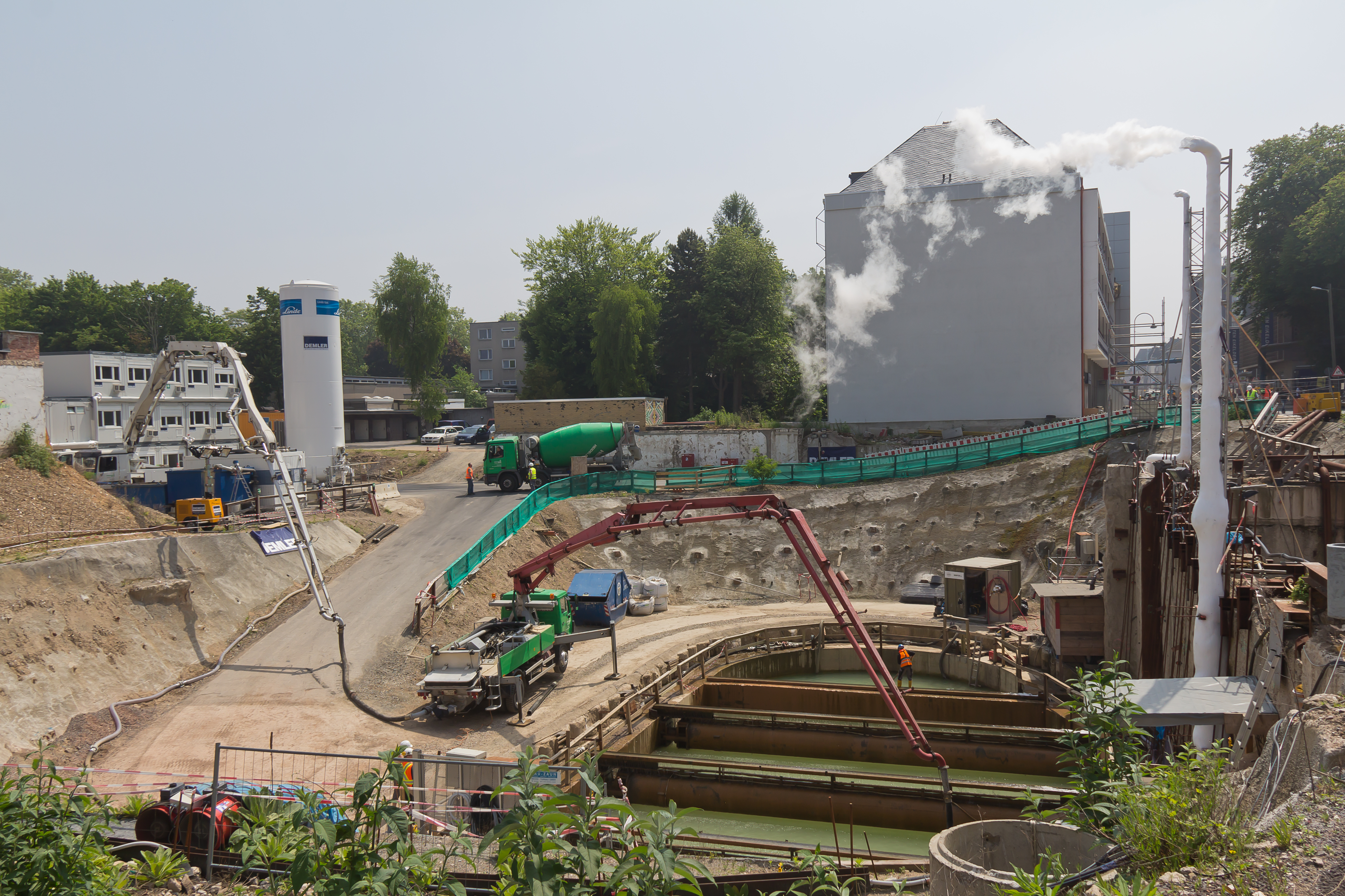 Historisches Archiv der Stadt Köln - Verfüllung der Bergungsbaugrube als vorbereitende Maßnahme zur Aushebung des Besichtungsbauwerkes. Im Hintergrund links befindet sich ein Tank zur Aufbewahrung flüssigen Stickstoffs für die Bodenvereisung. Über die Rohre rechts wird der benutzte Stickstoff wieder in die Atmosphäre entlassen.